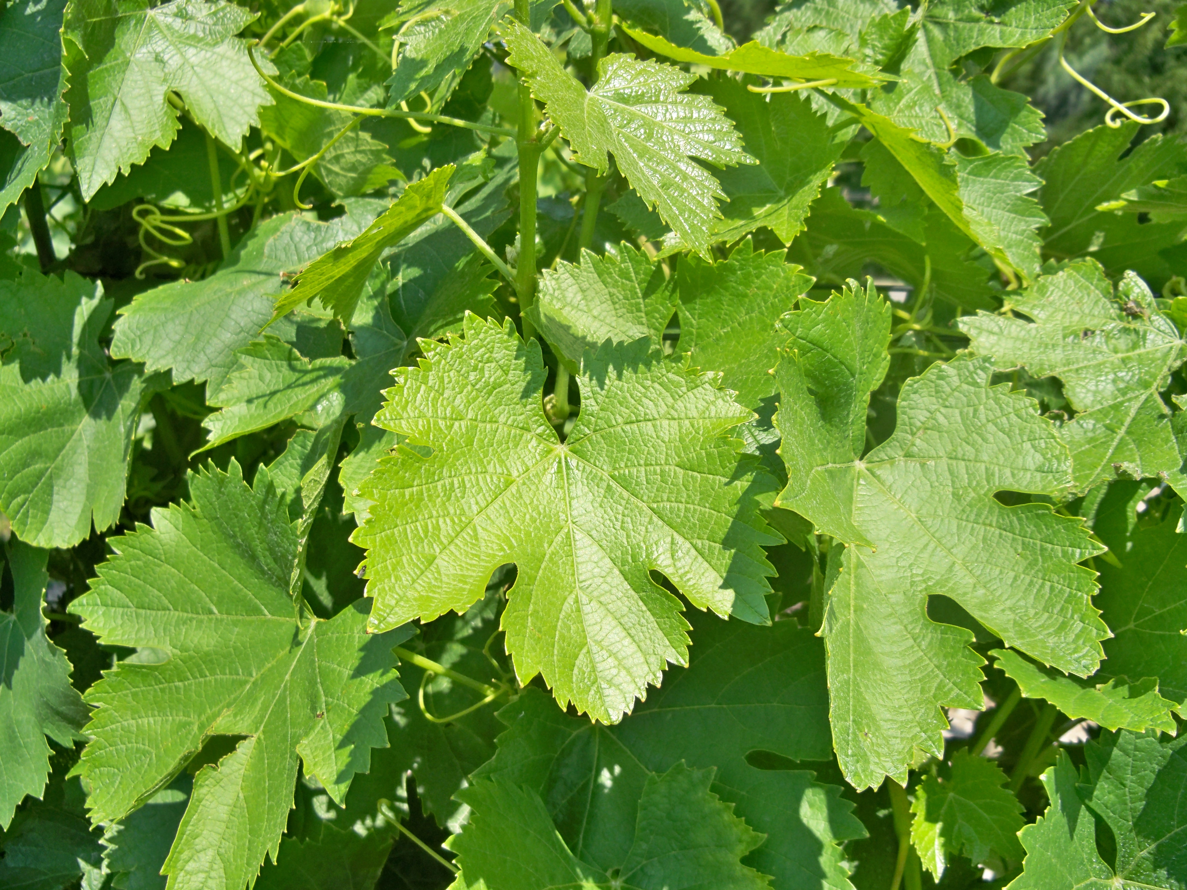 Feuilles de Vignes - Cinsault